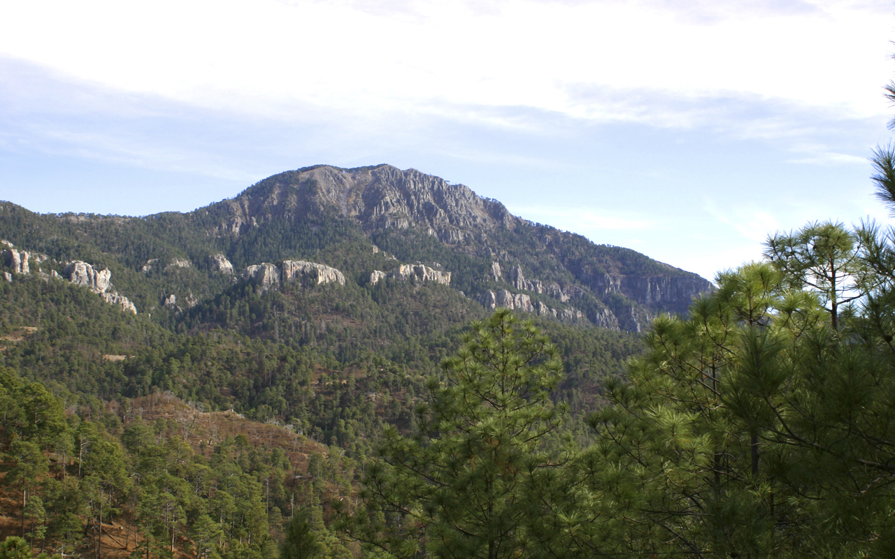 (Descripción original) Cerro del mohinora a 3470 metros sobre el nivel del mar, cerro del mohinora, municipio de guadalupe y calvo, chihuahua, (informacion subida a la red por luis alfonso uribe, ponchin)